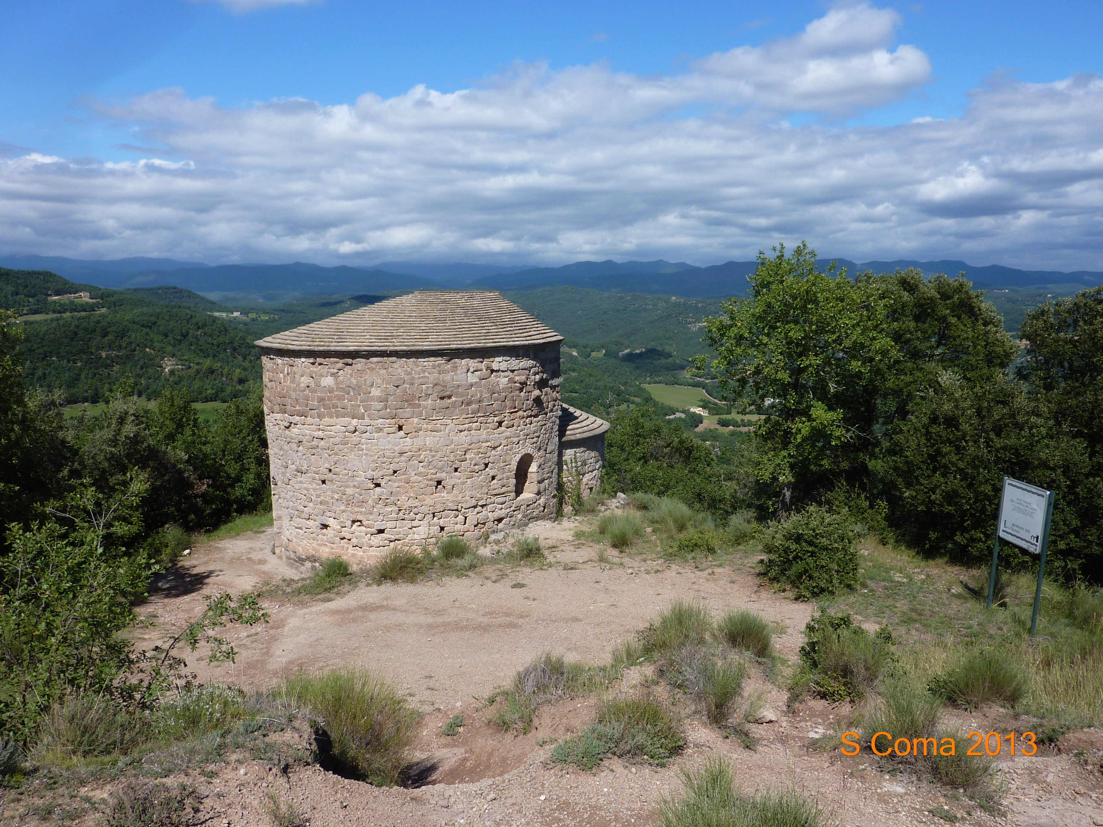 Capella de Sant Vicenç, al costat del Castell de Lluçà